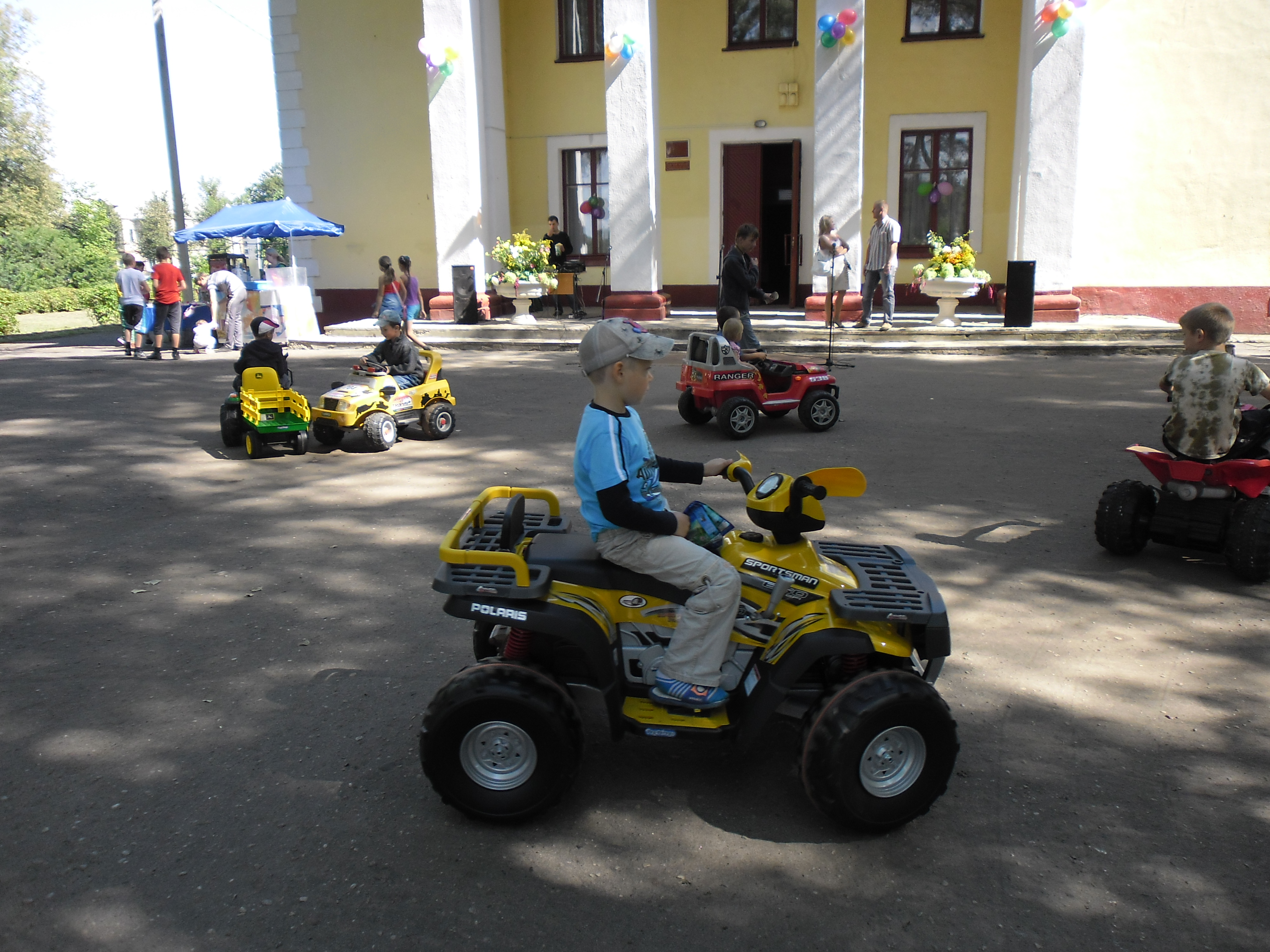 День Посёлка